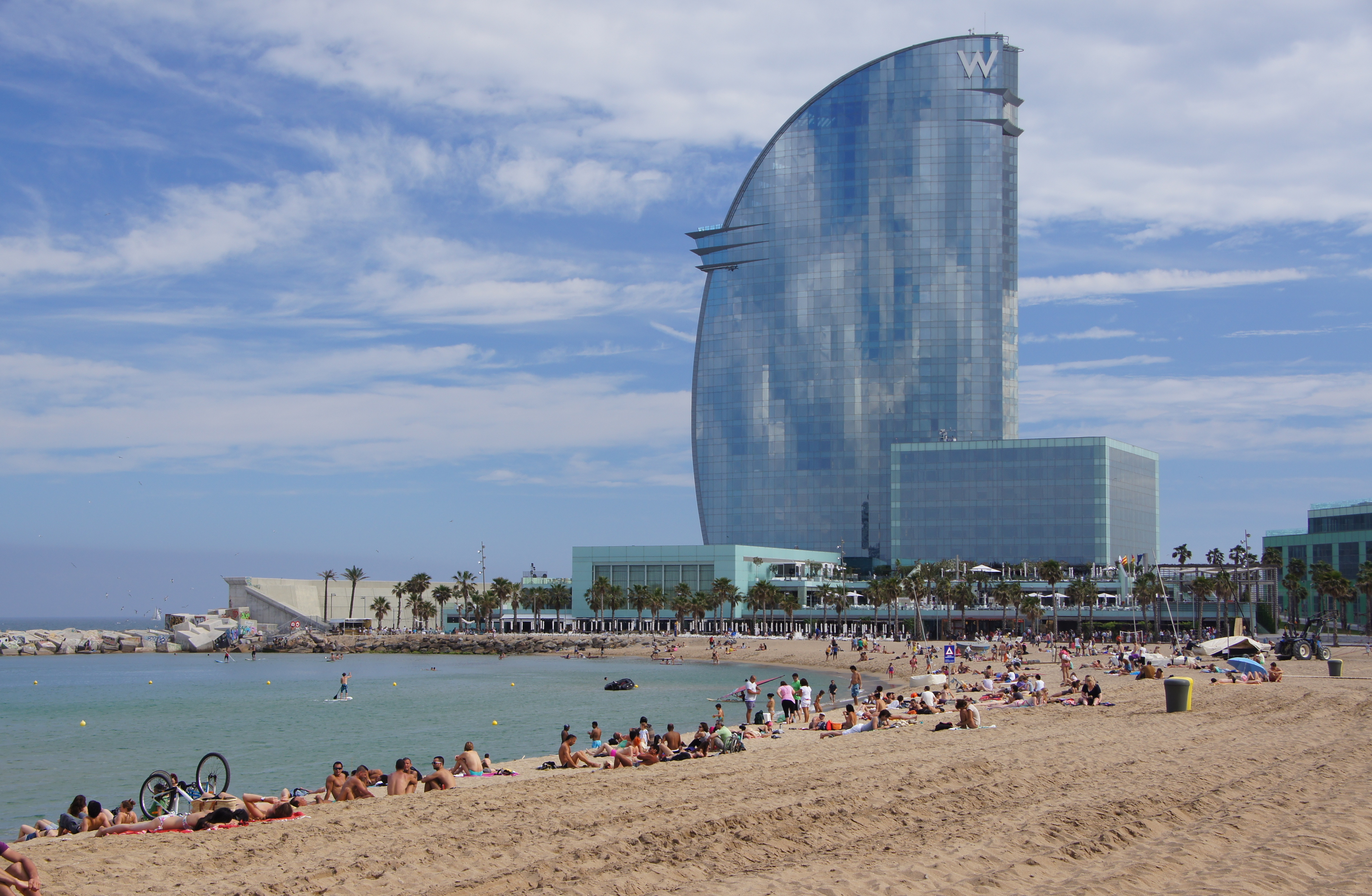 barcelona